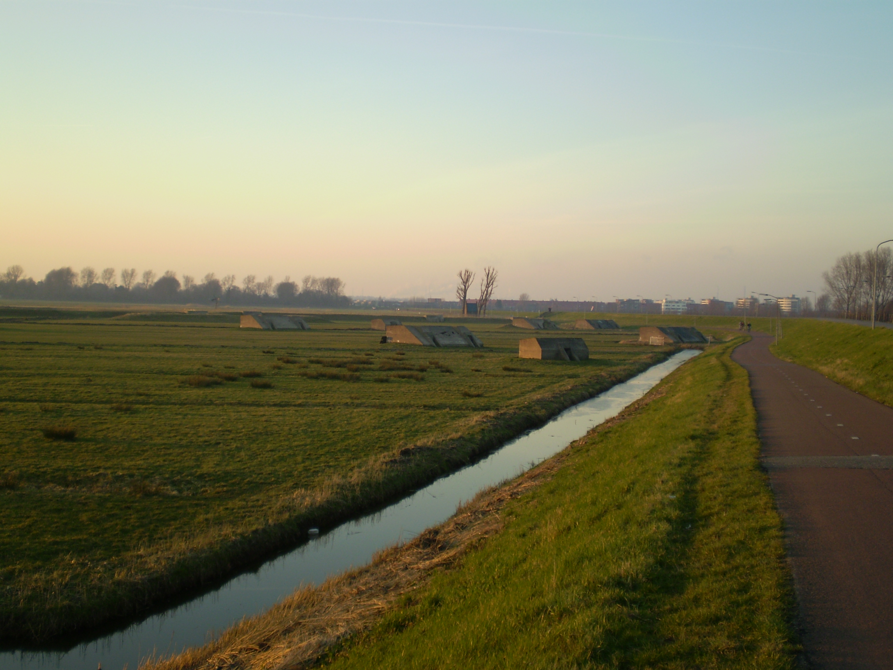 Stelling van Amsterdam: bomvrije schuilplaatsen (opgericht tussen 1917 en 1919) bij Spaarndam